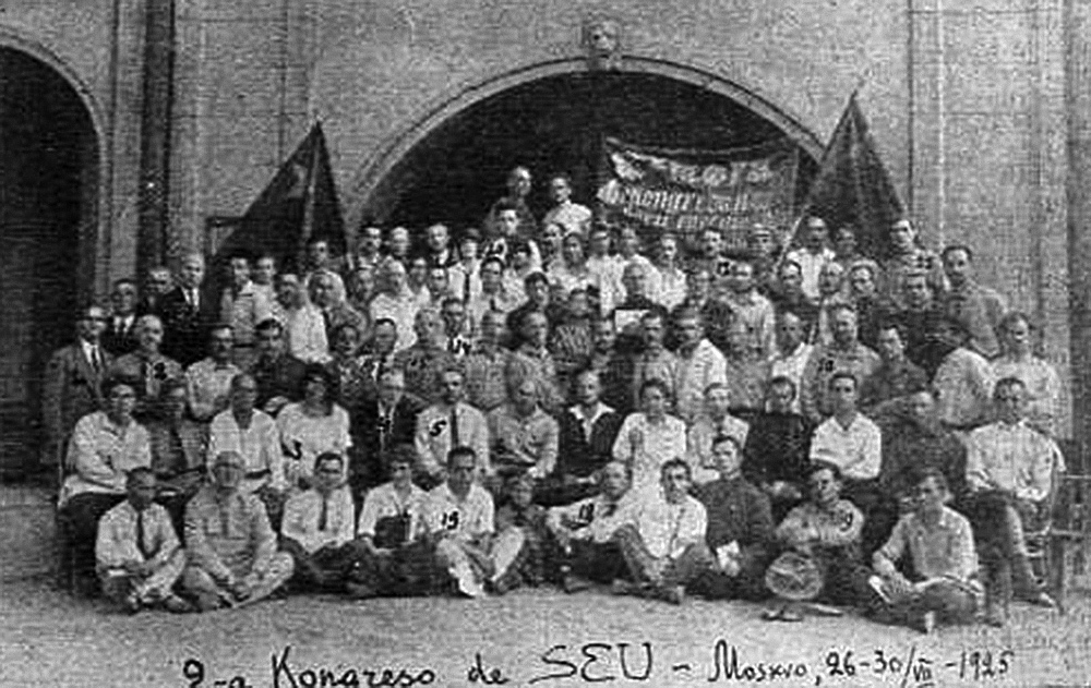 2-a Kongreso de Sovetrespublikara Esperantista Unio, Moskvo 26-30.07.1925